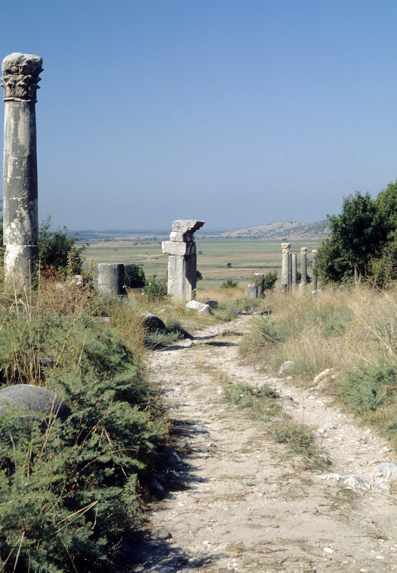 Antike Stadt Hierapolis Castabala bei Osmaniye, Südtürkei, Säulenstraße